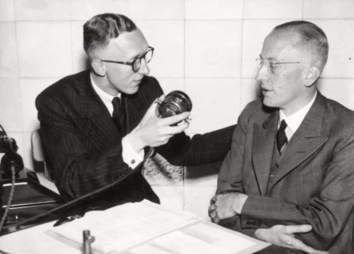 Tweede Wereldoorlog. Carel Piek, lid van de Germaanse SS, landelijke leider van de NVD (Nederlandsche Volksdienst), wordt geinterviewd over de juist opgerichte stichting NVD. Interviewer is L.G. Wybrands-Marcussen, hoofd van de afdeling reportage van de Nederlandsche Omroep. Den Haag, Nederland, 31 juli 1941.